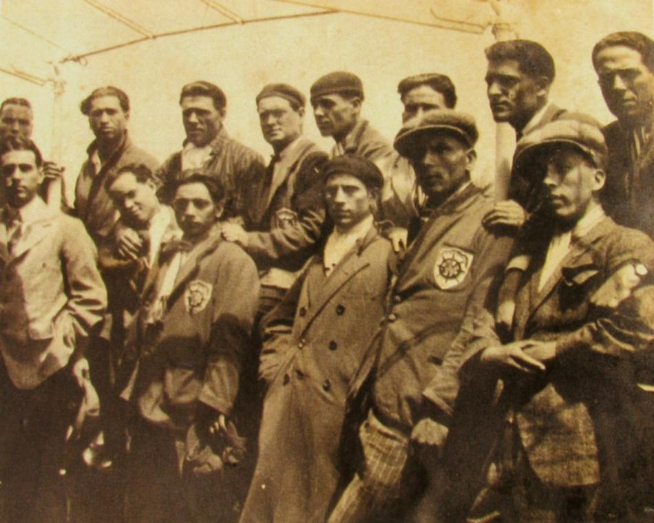 Comitiva do Club Sport Marítimo. Ilha de São Miguel, Maio de 1923. Colecção Club Sport Marítimo.